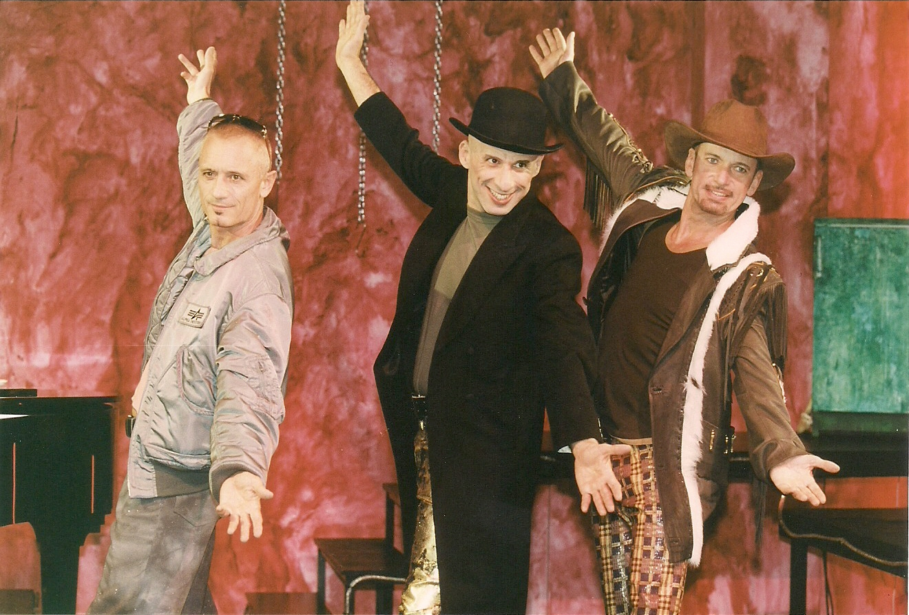 גיל אלון במחזמר "הגברים של מהגוני" בגרמניה"